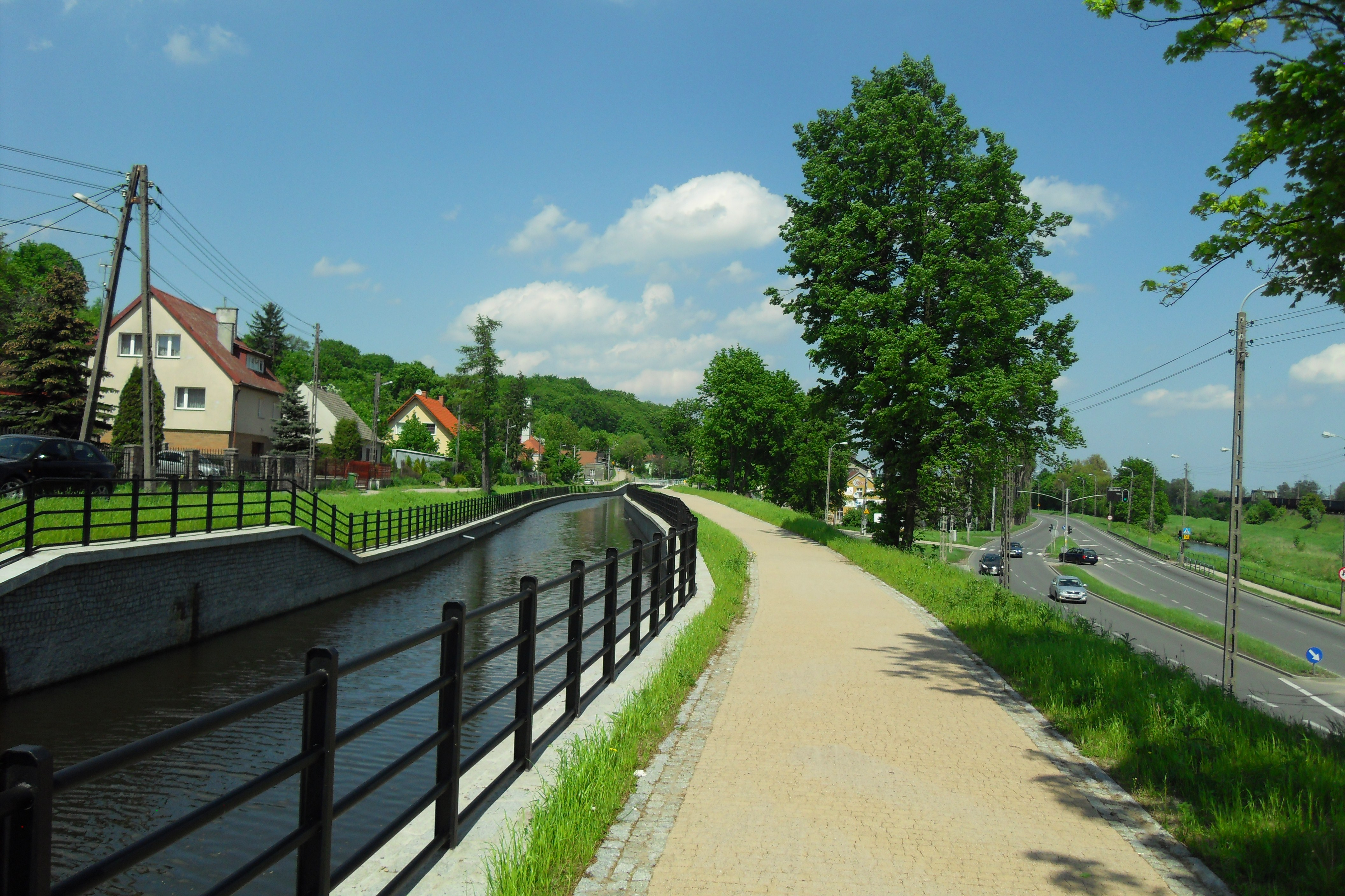 Gdańsk Święty Wojciech - kanał Raduni, widok w kierunku ujścia. Stan po przebudowie.